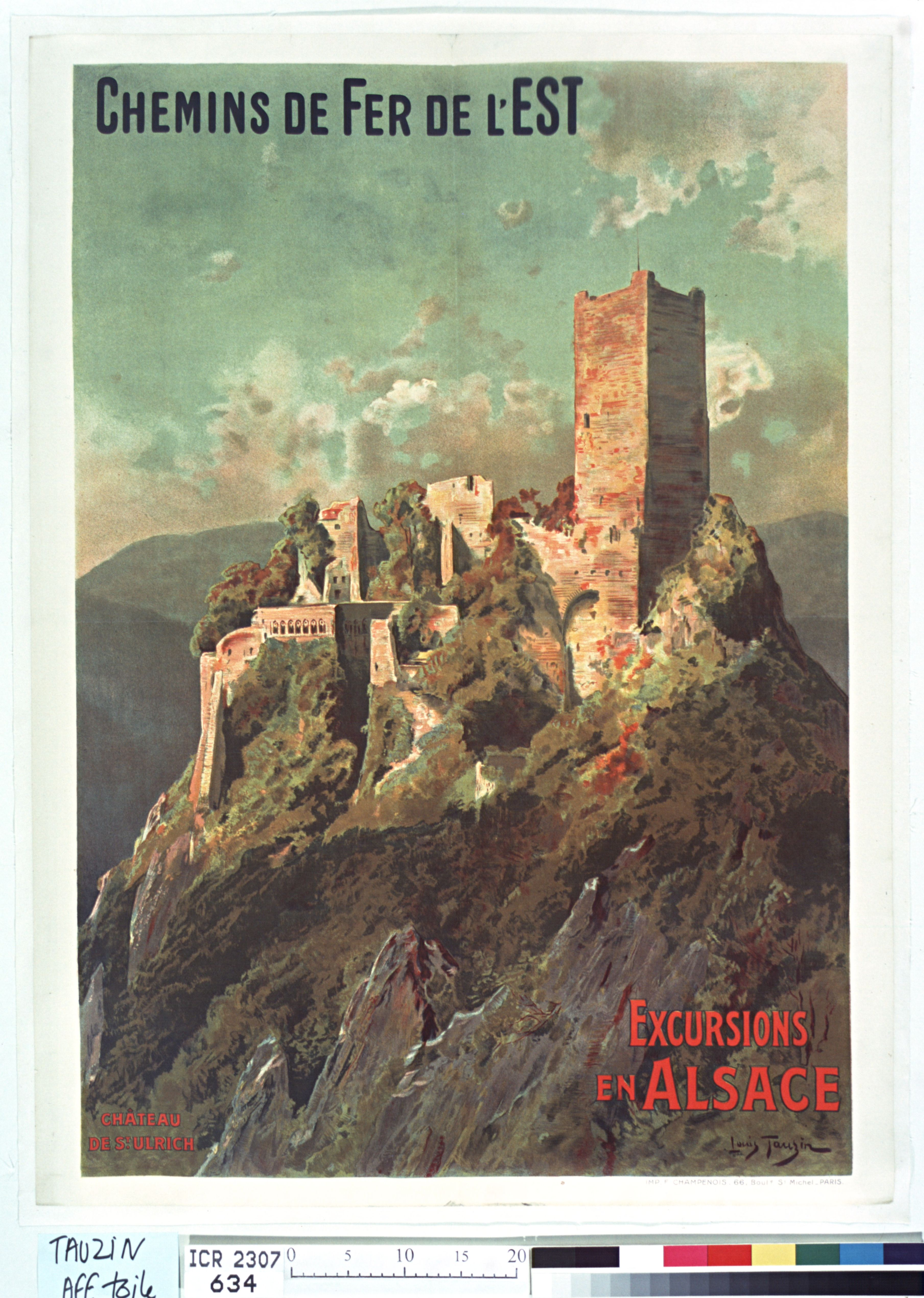 Chemins de fer de l'Est. Excursions en Alsace. Château de St Ulrich, affiche